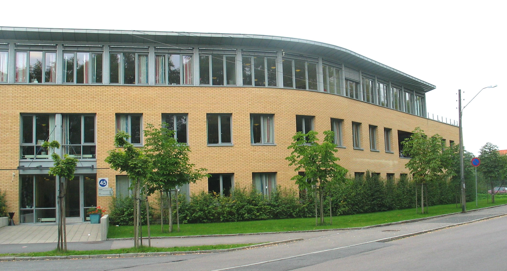 Picure of LAR ØST. Legemiddelassistert rehabiliteirng, Nasjonalt kompetansesenter, regional vedtaksmyndighet, poliklinkk for Oslo